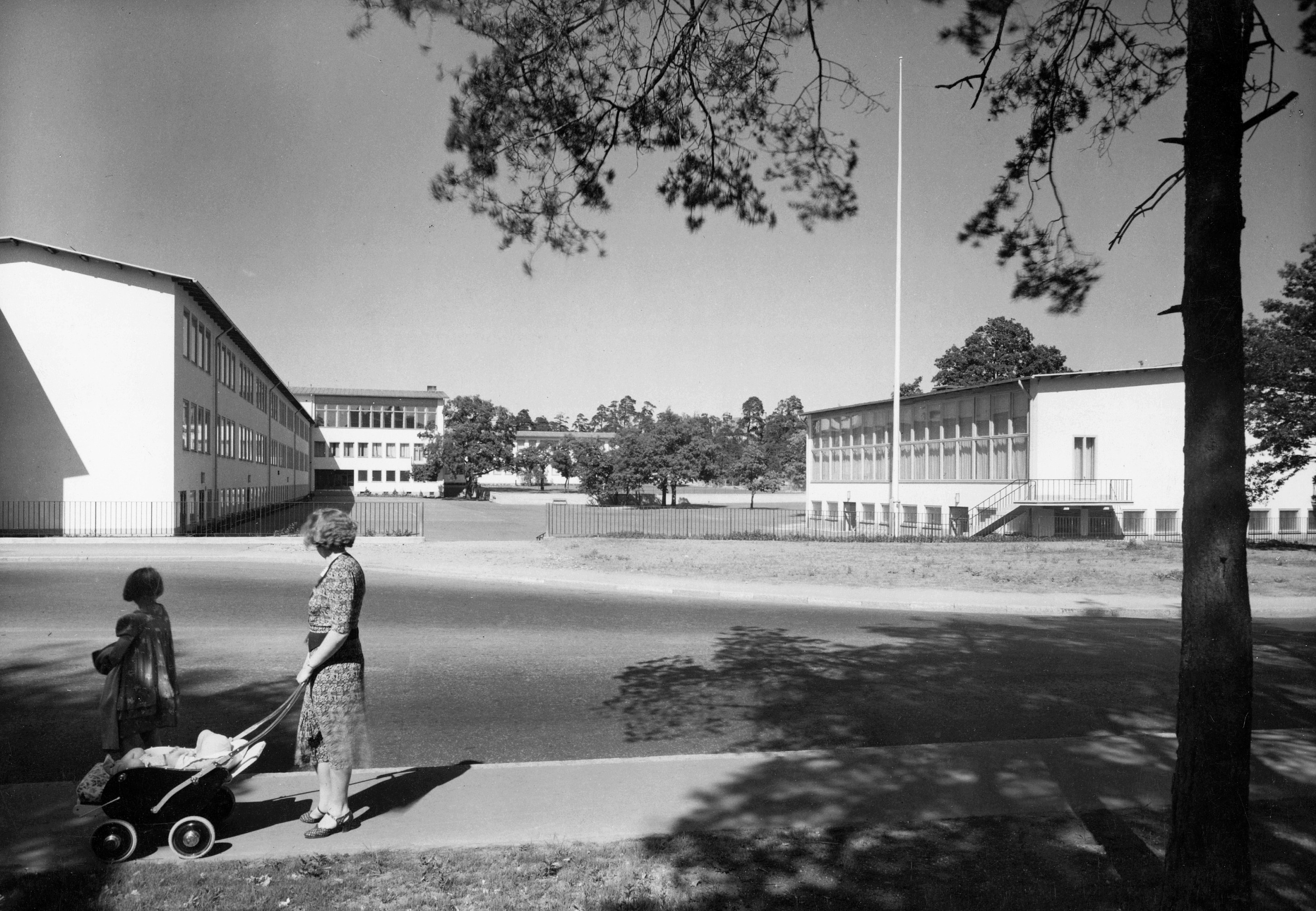 Fredhälls folkskola, på Kungsholmen, arkitekt Paul Hedqvist